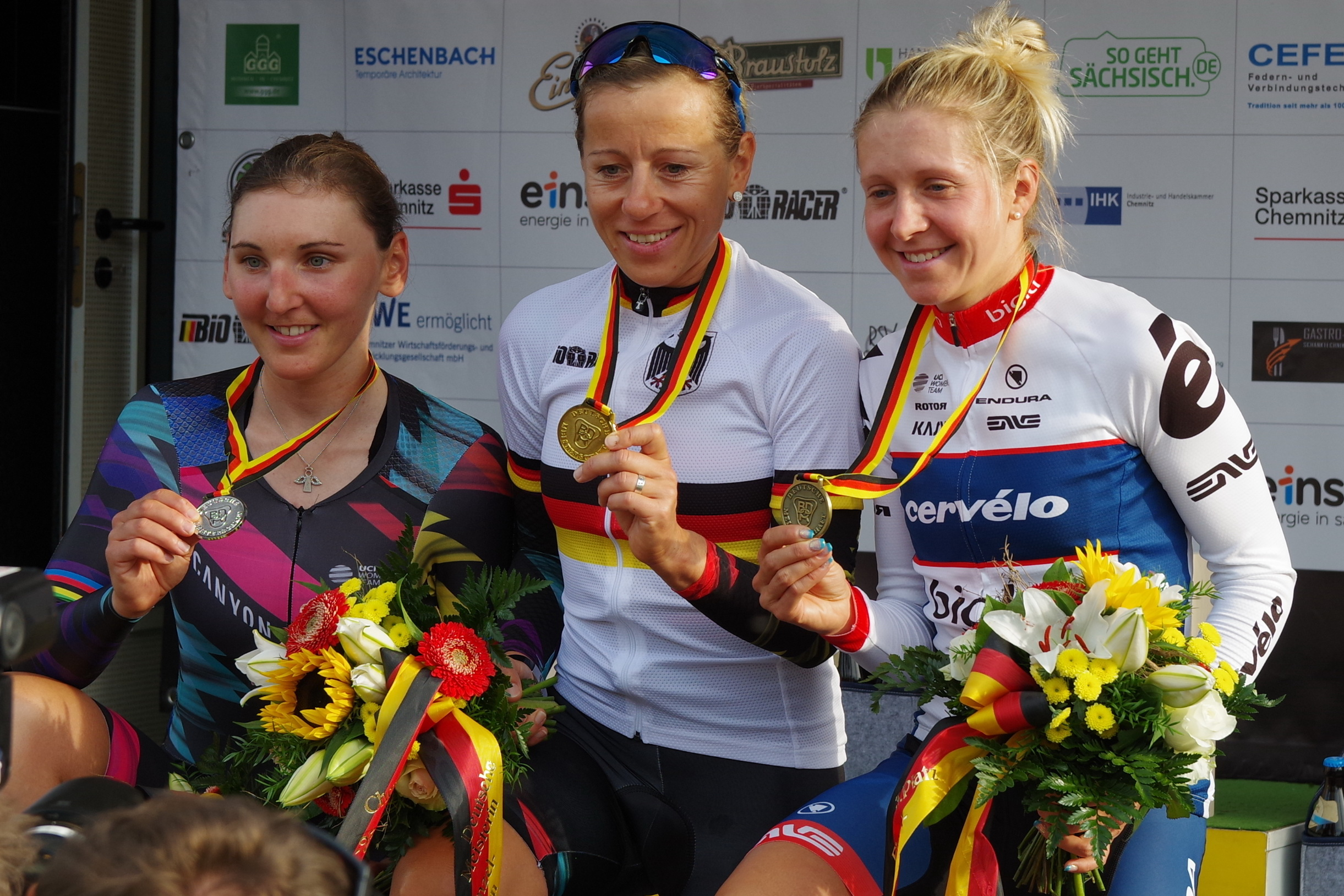 Deutsche Meisterschaften im Einzelzeitfahren 2017 23. Juni 2017 Siegerehrung Damen Platz 1: Trixi Worack Platz 2: Lisa Brennauer Platz 3: Stephanie Pohl The making of this document was supported by the Community-Budget of Wikimedia Germany.